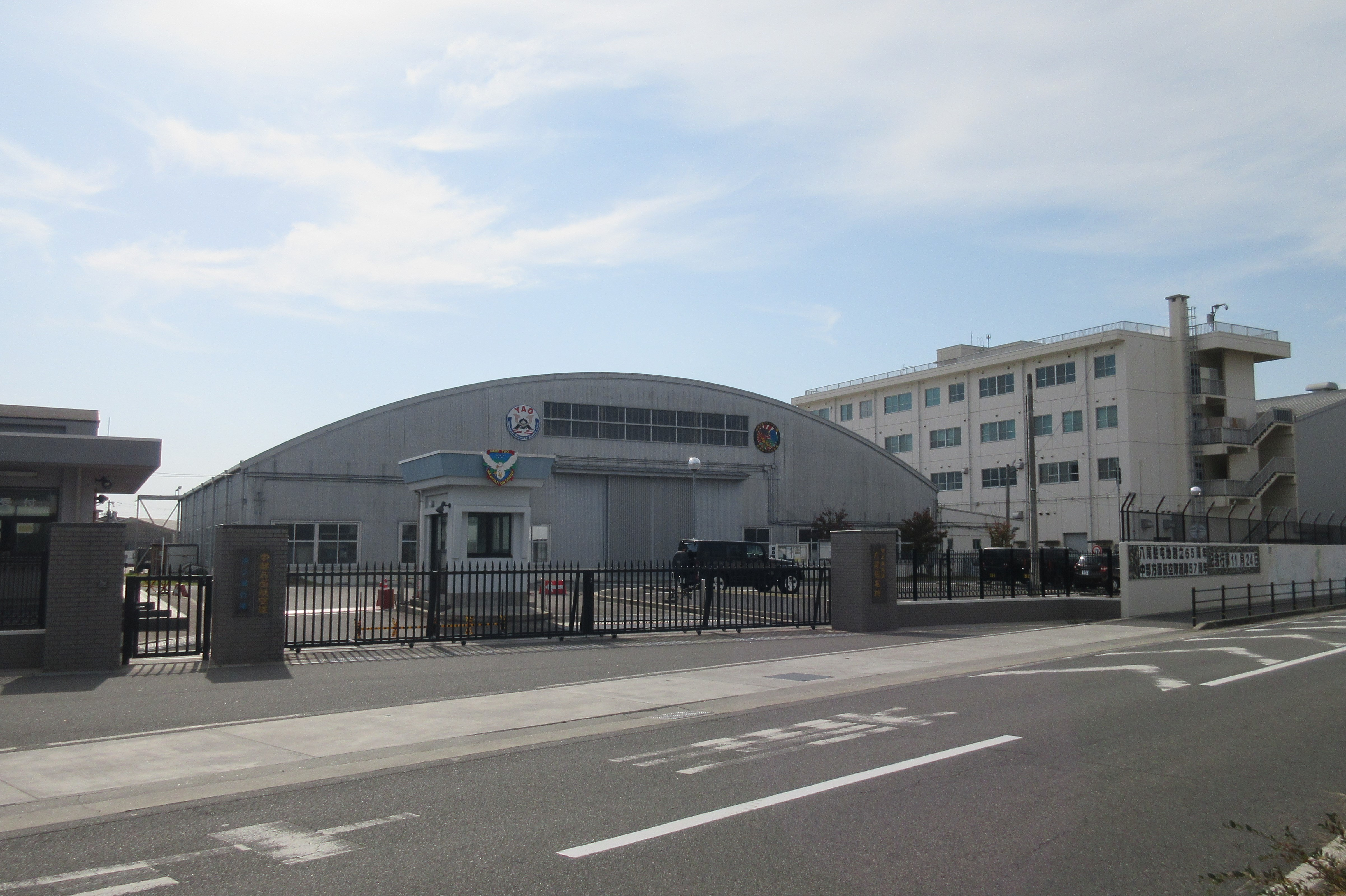 陸上自衛隊八尾駐屯地正門